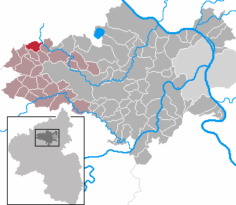 Gemeinde Arft im Landkreis Mayen-Koblenz